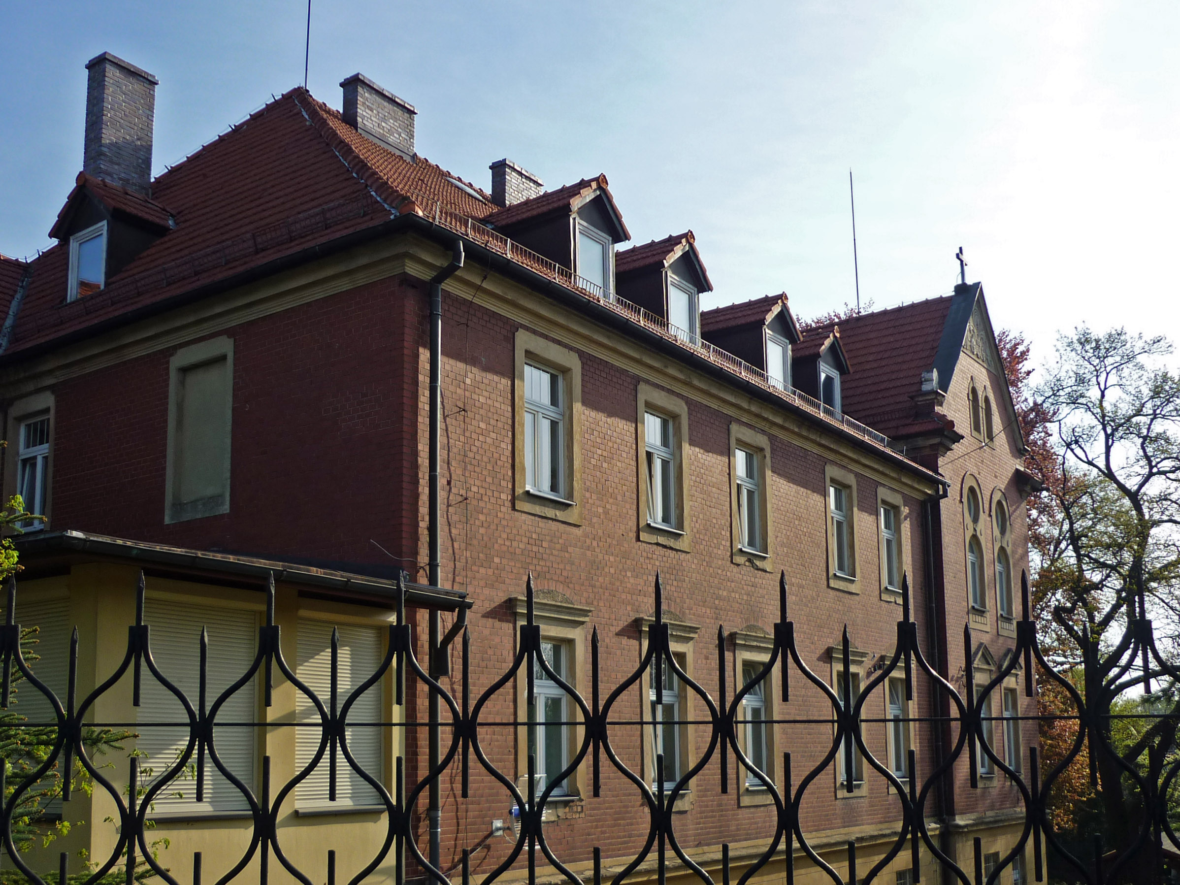 Mutterhaus des polnischen Magdalenerinnen-Klosters in Lauban (Lubań) in Niederschlesien